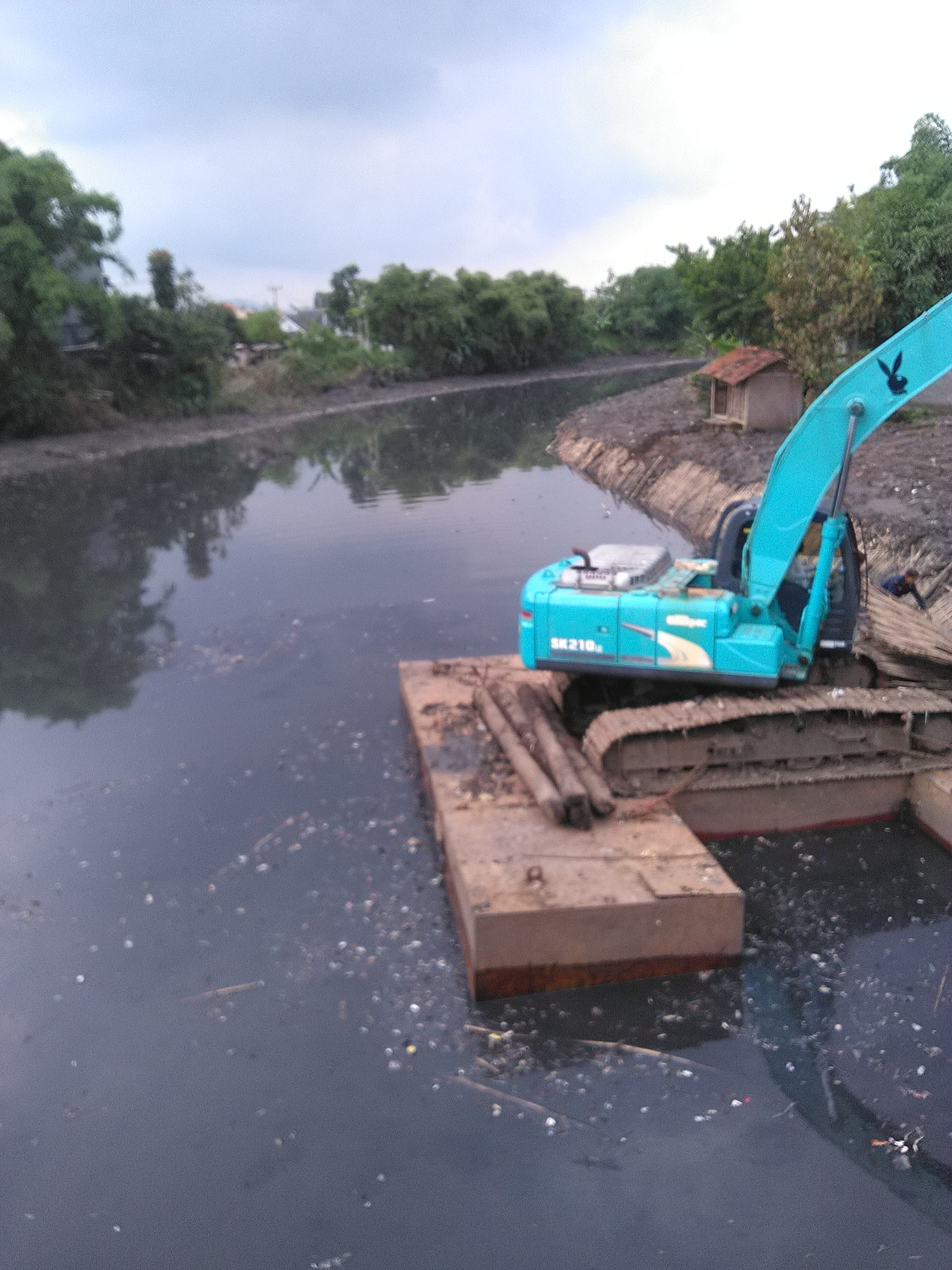 Sebuah Bekhu sedang menggali jalur sungai Jembatan Citarum Asli Sayuran-Rancamanyar(sblm di pindahkn ke Jalur yang sekarang dilalui ) yang sudah lama menjadi lahan Hutan kosong dan ilalang, sehingga menyebabkan aliran Sungai citarum tidak bisa melalui jalur ini